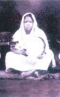 La chanteuse Sitti Bint Saad, de Zanzibar, et ses musicienns